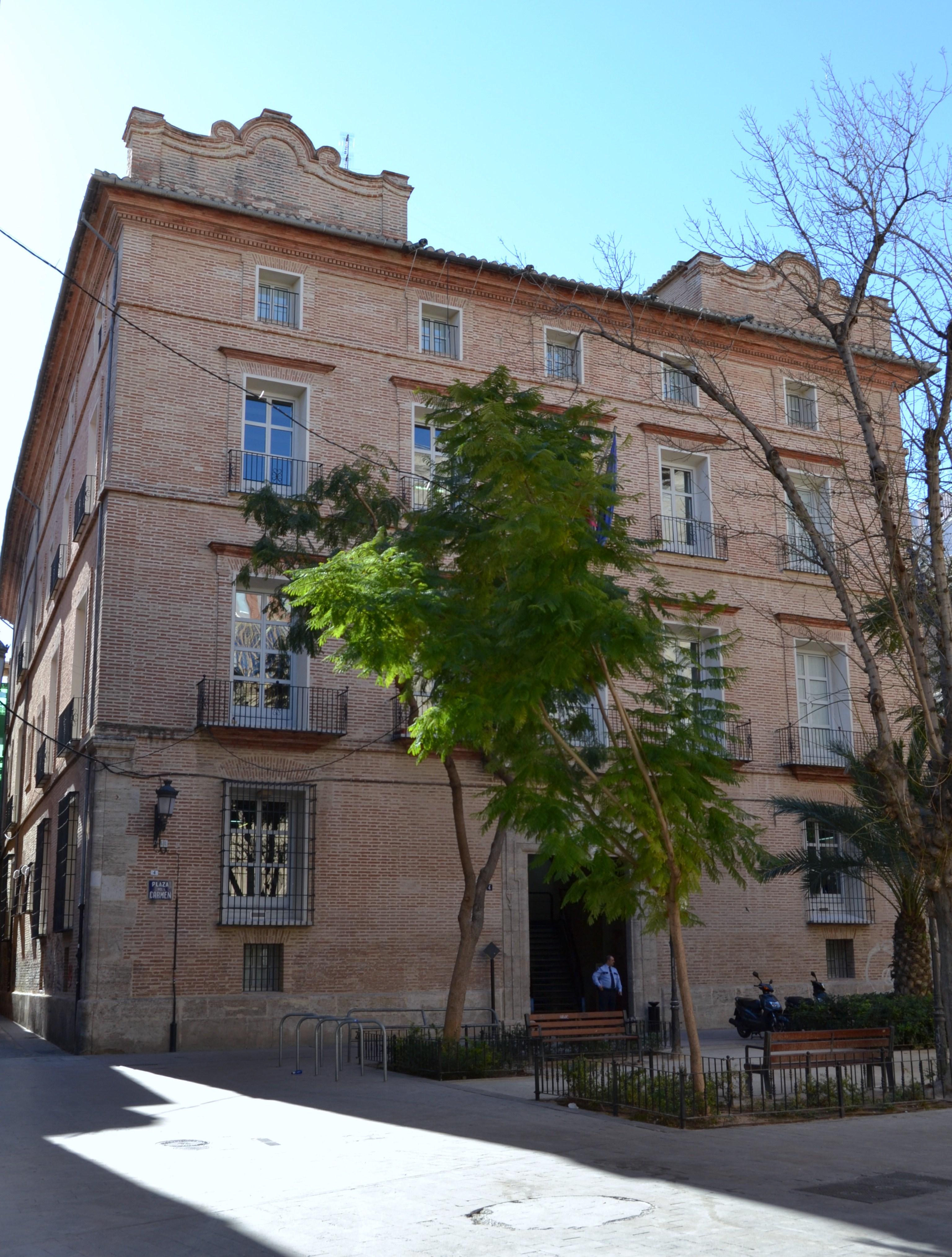 Palau de Pineda de València.